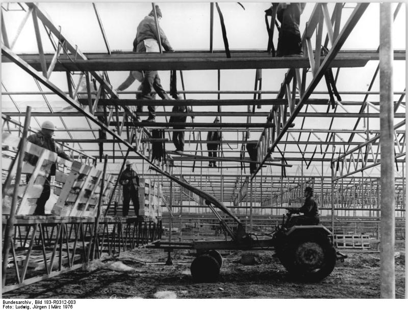 ADN-ZB-Ludwig-12.3.76-Bez. Erfurt: Was hier wie ein mittlerer Industriebau aussieht, sind neue Gewächshäuser für das VEG Saatzucht-Zierpflanzen Erfurt, Betrieb Mittelhausen. Mit einer Anbaufläche von bisher 120.000 m² unter Glas und Folie ist der Betrieb einer der größten Gewächshausanlage der DDR. Facharbeiter des Landtechnischen Anlagenbaus Mihla haben den weiteren planmäßigen Ausbau bis 1980 übernommen. Bisher 160 Tonnen Treibgemüse haben die Werktätigen seit Jahresbeginn im gesamten Bezirk Erfurt an Handel und Gaststätten geliefert. Der Betrieb in Mittelhausen hat hohen Anteil daran. Aus seiner spezialisierten Produktion kommen hochwertige Gemüsesorten und Blumenzüchtungen.